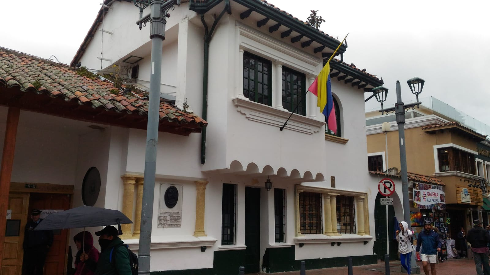 Localidade de Usaquén